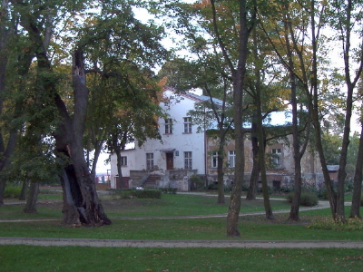 Zdjęcie z 2004 r., autor: Magdalena Nowicka Zespół dworsko-parkowy znajdujący się w Jasieniu przy ul. Zwierzynieckiej, zajmuje powierzchnię około 2 ha. Współcześnie zachowany budynek dworu jest murowany z cegły, pochodzi z I poł. XIX wieku.